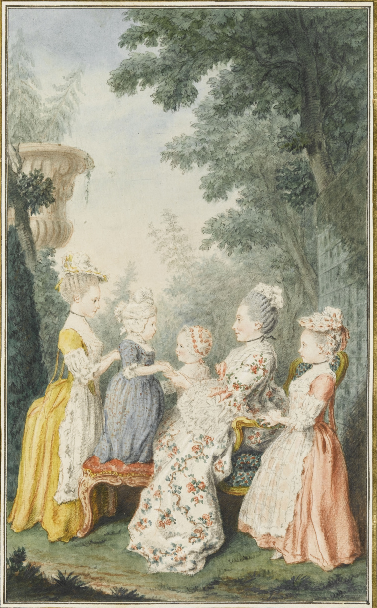 Madame la présidente de Lamoignon et ses enfants (Marie-Elisabeth Berryer, épouse de Chrétien-François de Lamoignon de Bâville, et ses enfants : Marie Catherine, future épouse d'Aguesseau ; Marie Gabrielle Olive, future épouse Feydeau de Brou ; Marie-Louise-Élisabeth, future comtesse Molé de Champlâtreux ; René-Chrétien-Auguste)